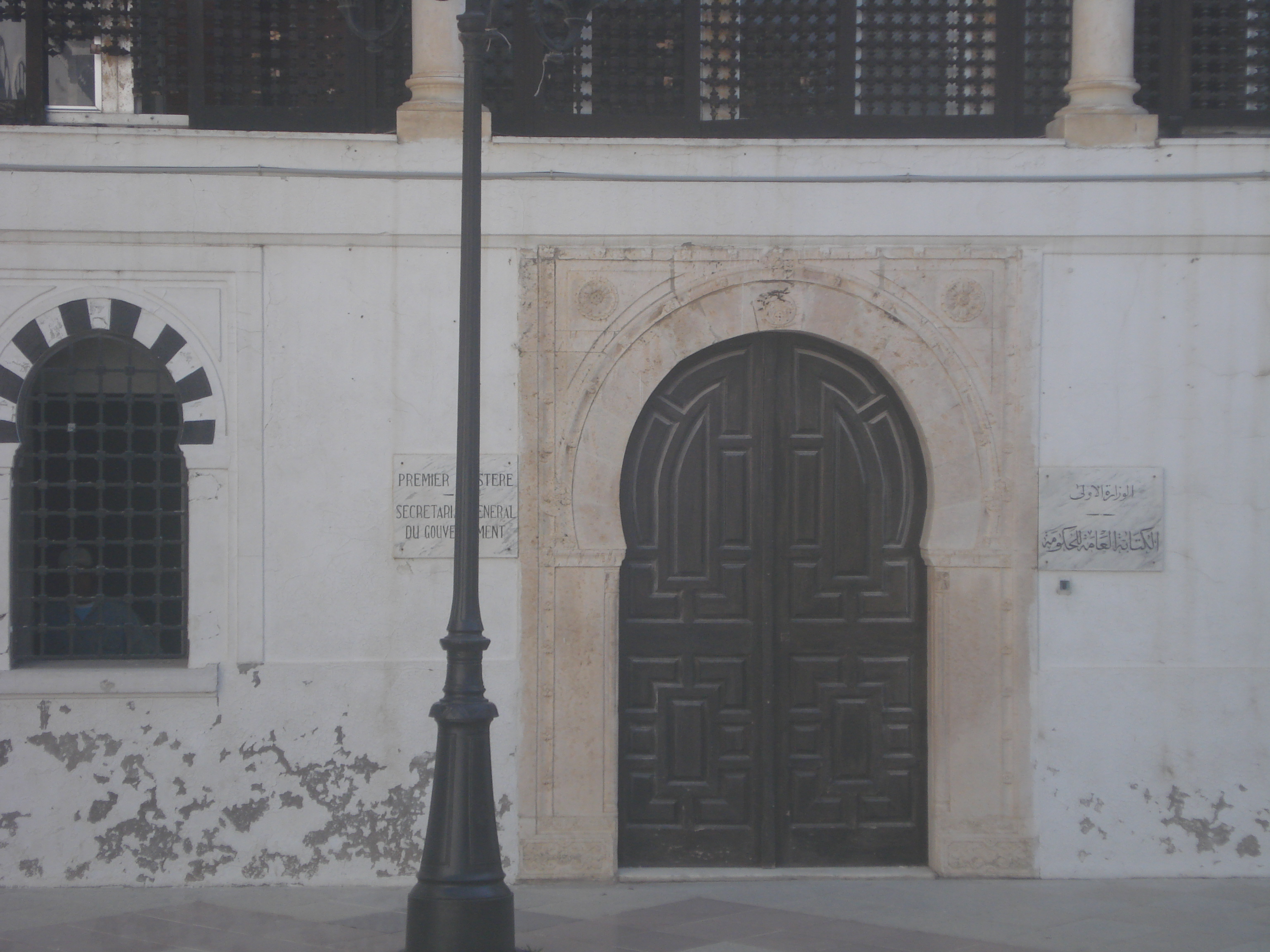 Porte du siège du secrétariat général du gouvernement tunisien dans la médina de Tunis